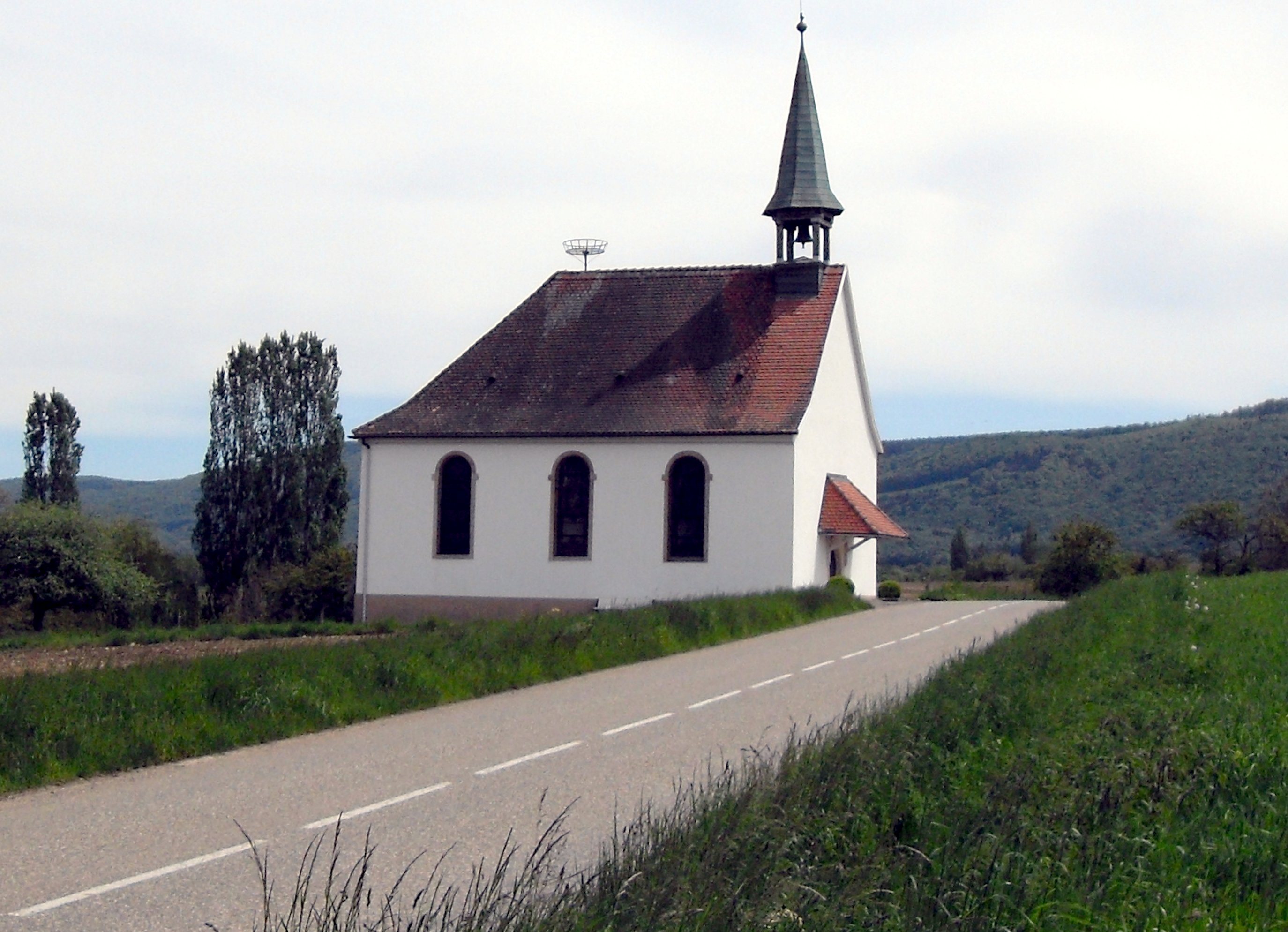 La chapelle de Mariabrunn à Raedersdorf